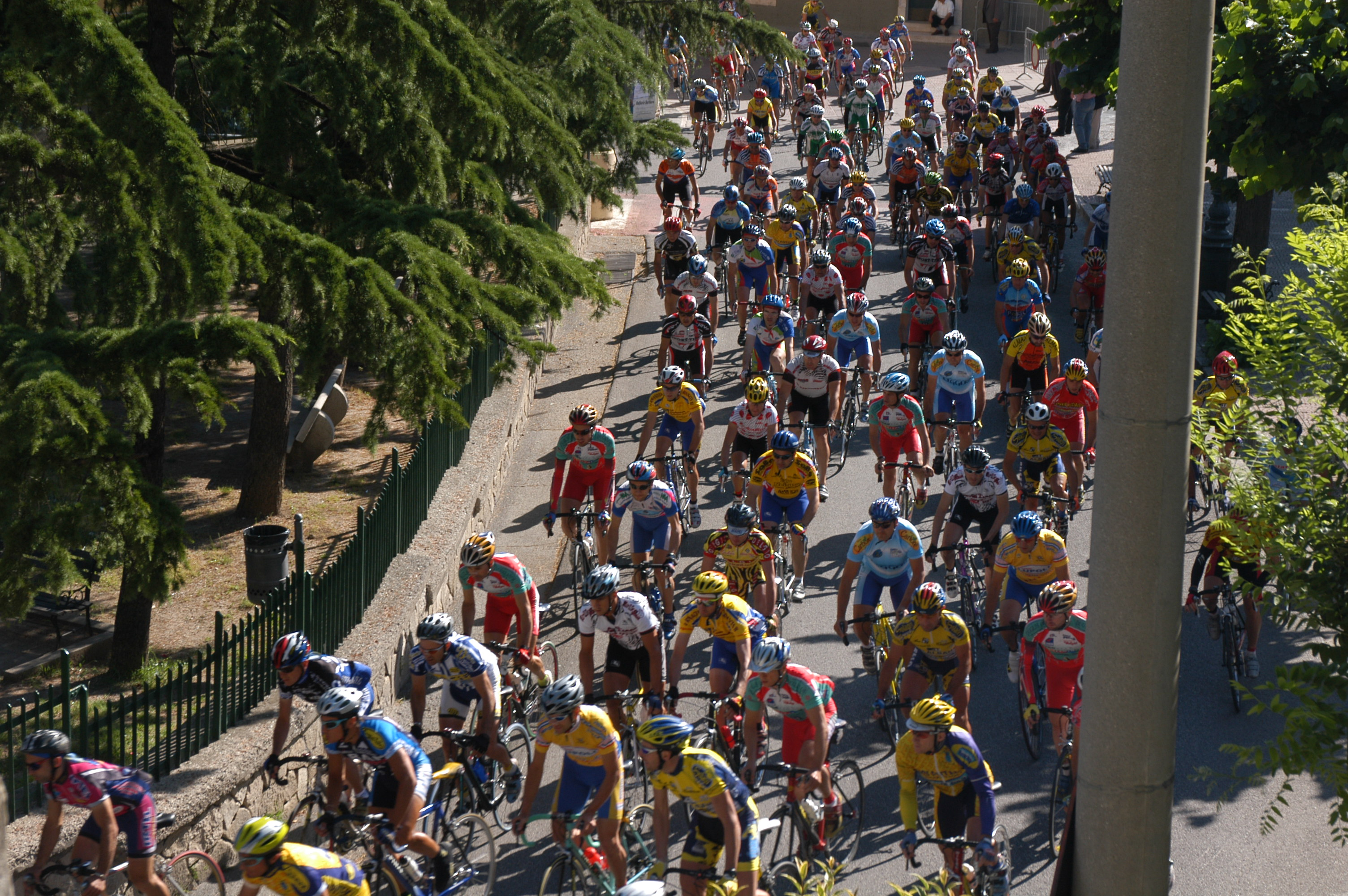 Gran Fondo del Vulture edizione 2004